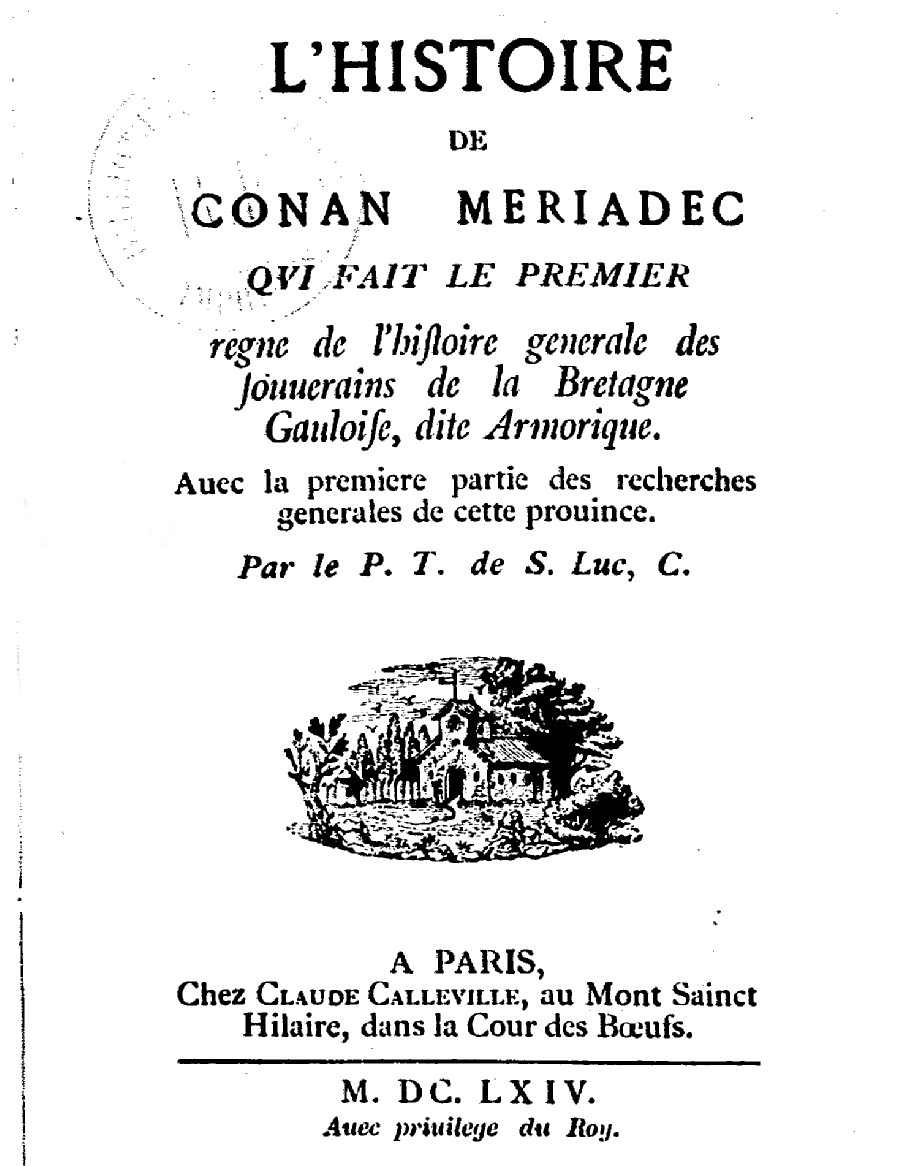 Toussaint de Saint-Luc, L'histoire de Conan Mériadec qui fait le premier règne de l'histoire générale des souverains de la Bretagne gauloise, dite Armorique : avec la première partie des recherches générales de cette province, L. Prud'homme (Saint-Brieuc), 1664 Conservé à la Bibliothèque nationale de France